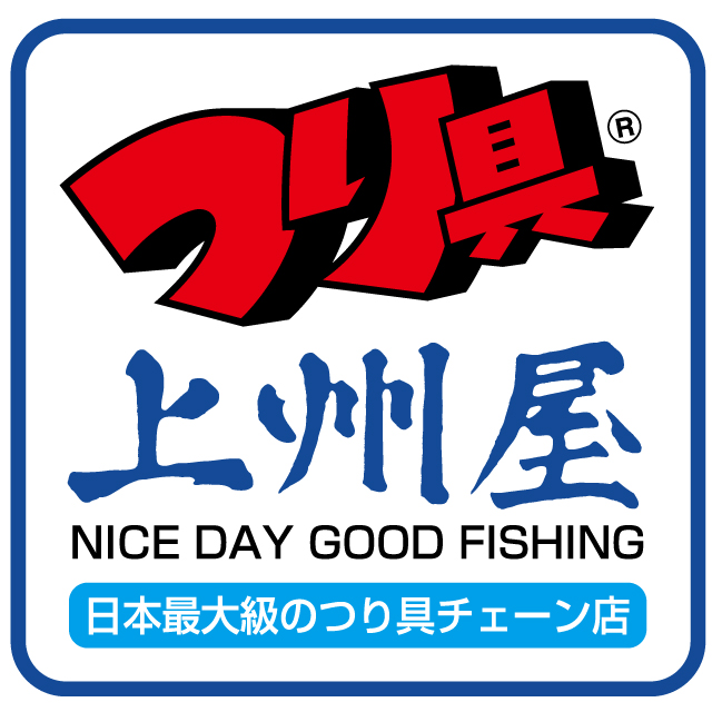 つり具の上州屋ロゴマーク